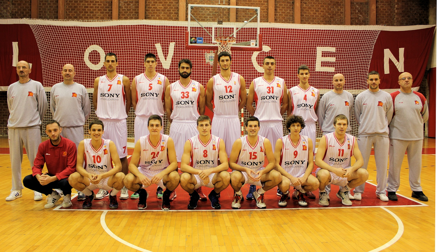 Srpskohrvatski / српскохрватски: KK Lovćen (sezona 2013/14)